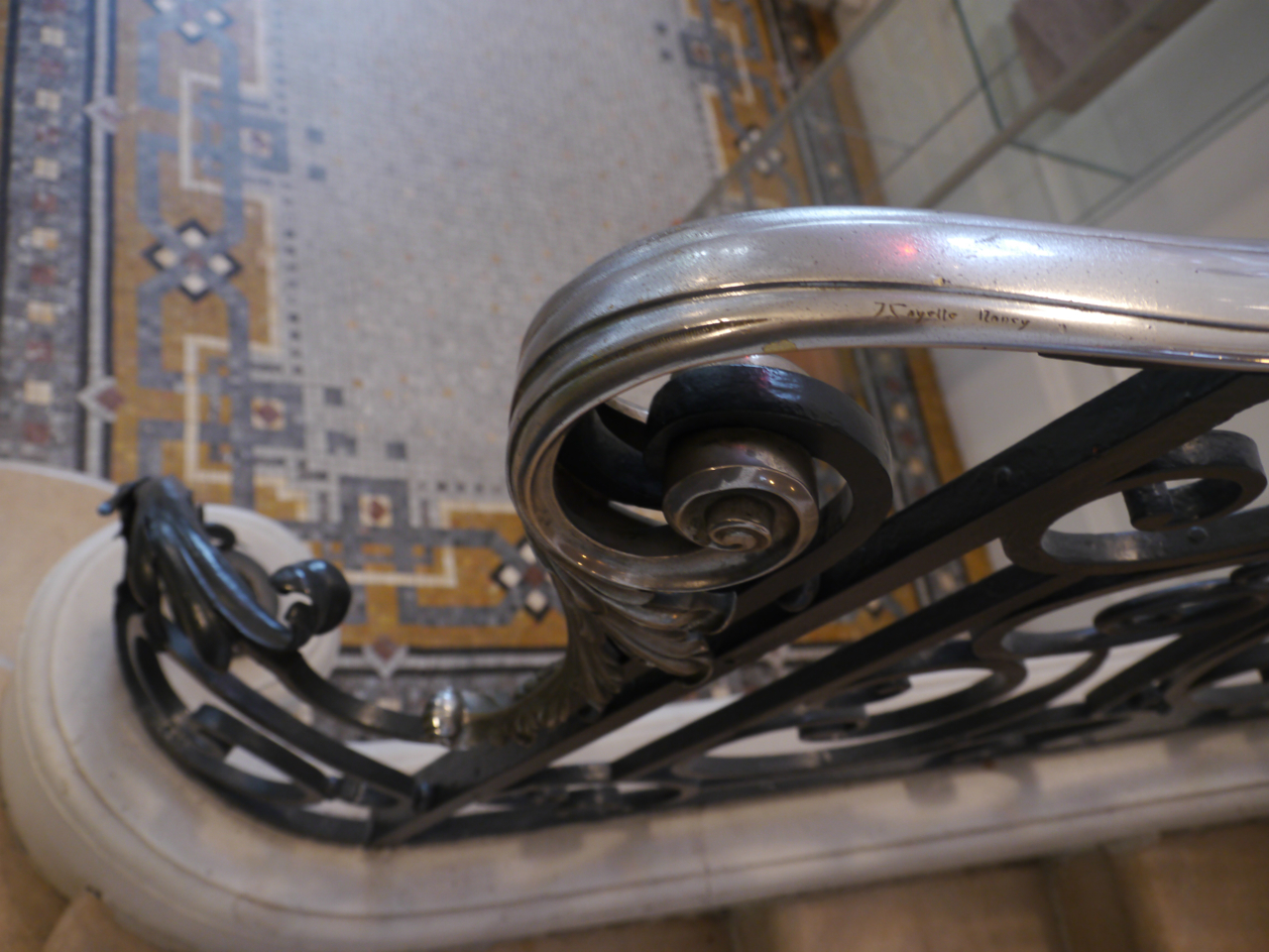 Rampe en fer forgé (vers 1920) signée par Jules Cayette au numéro 39 rue de la Ravinelle à Nancy. Villa Simon devenu Hôtel Vilgrain